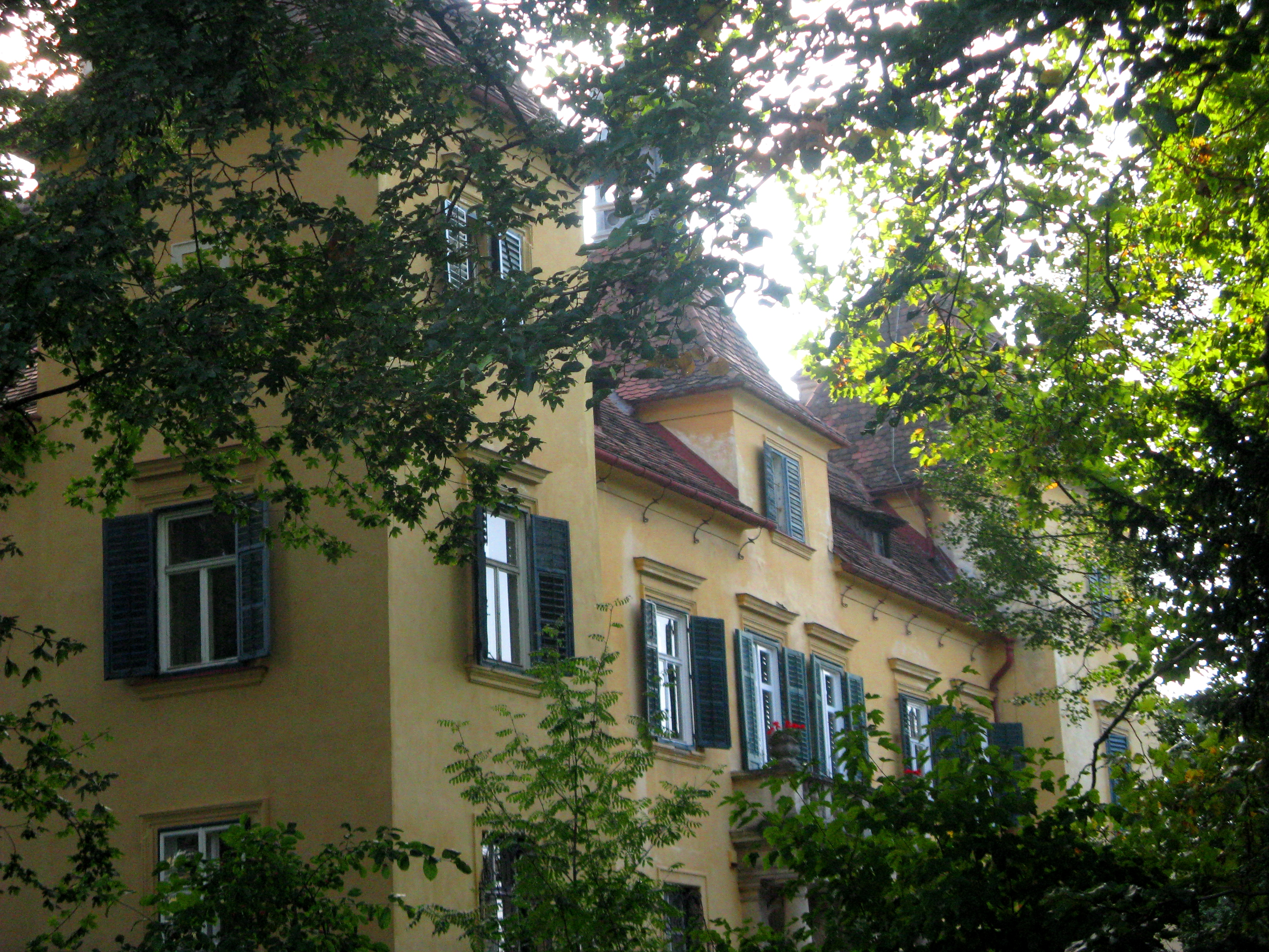 Hallerschloss mit Wirtschaftsgebäude und Gartendenkmale